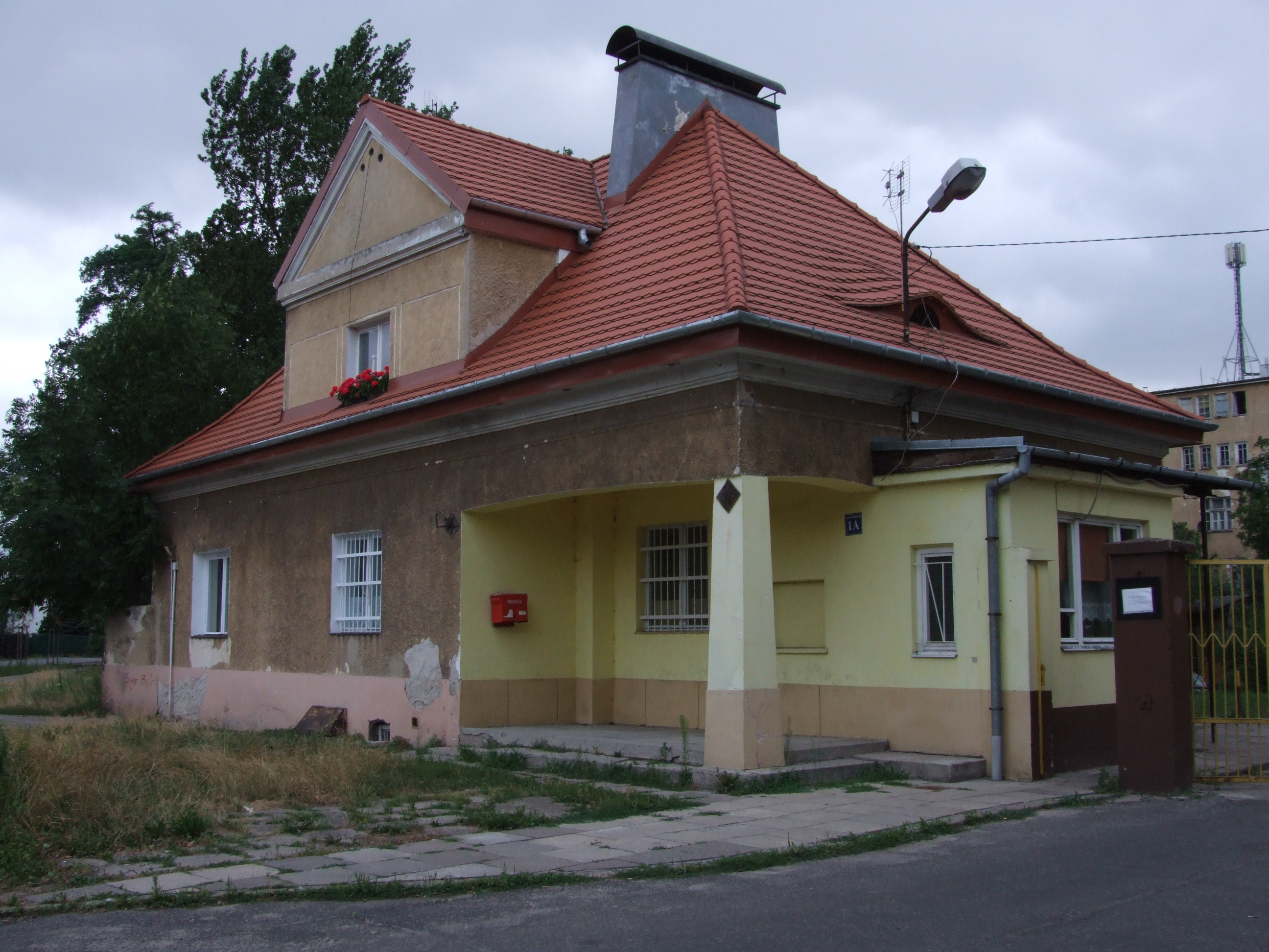 Wojewódziki Szpital dla Nerowowo i Psychicznie Chorych "Drewnica"